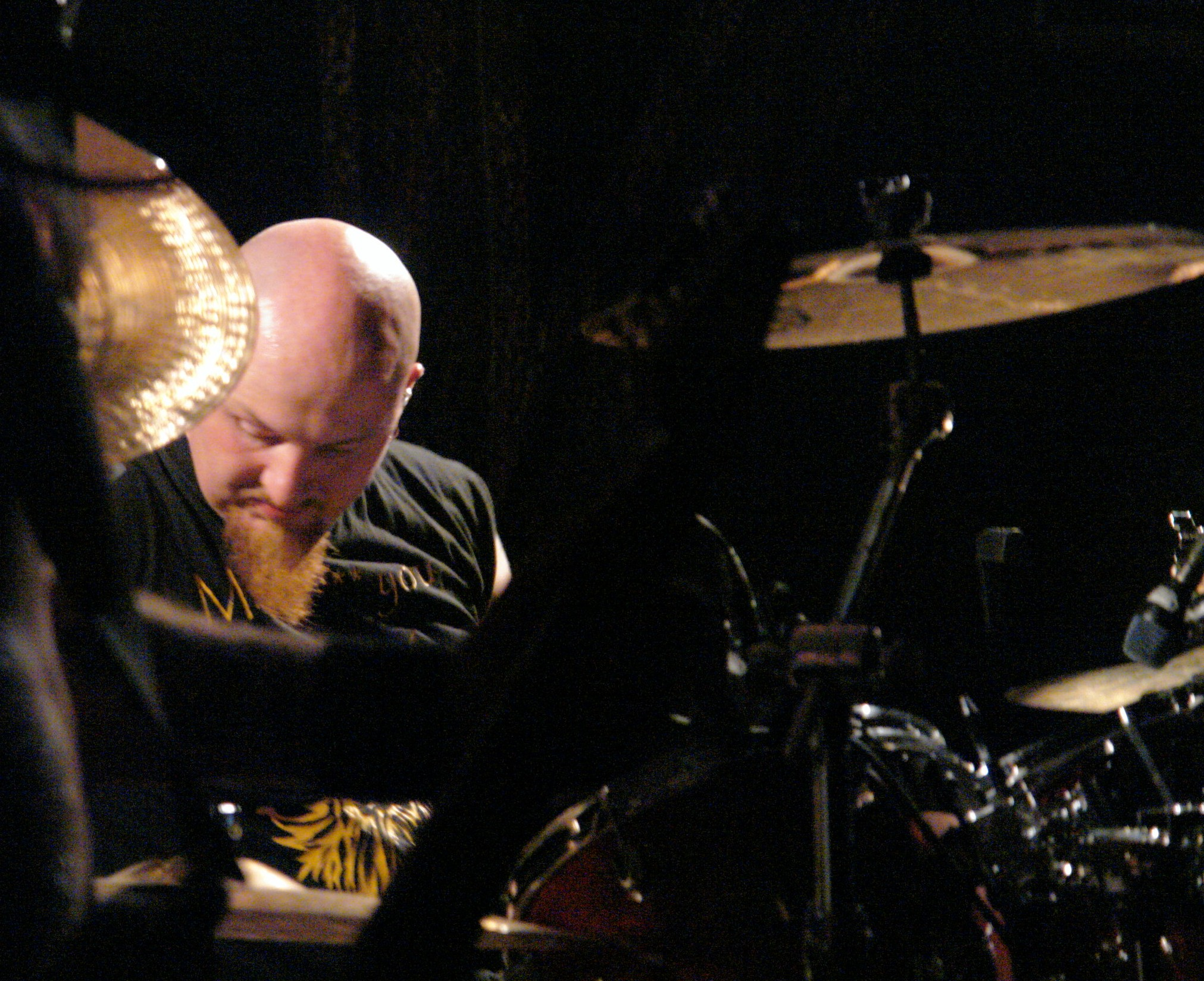 Faroese Viking Metal band Týr in Copenhagen